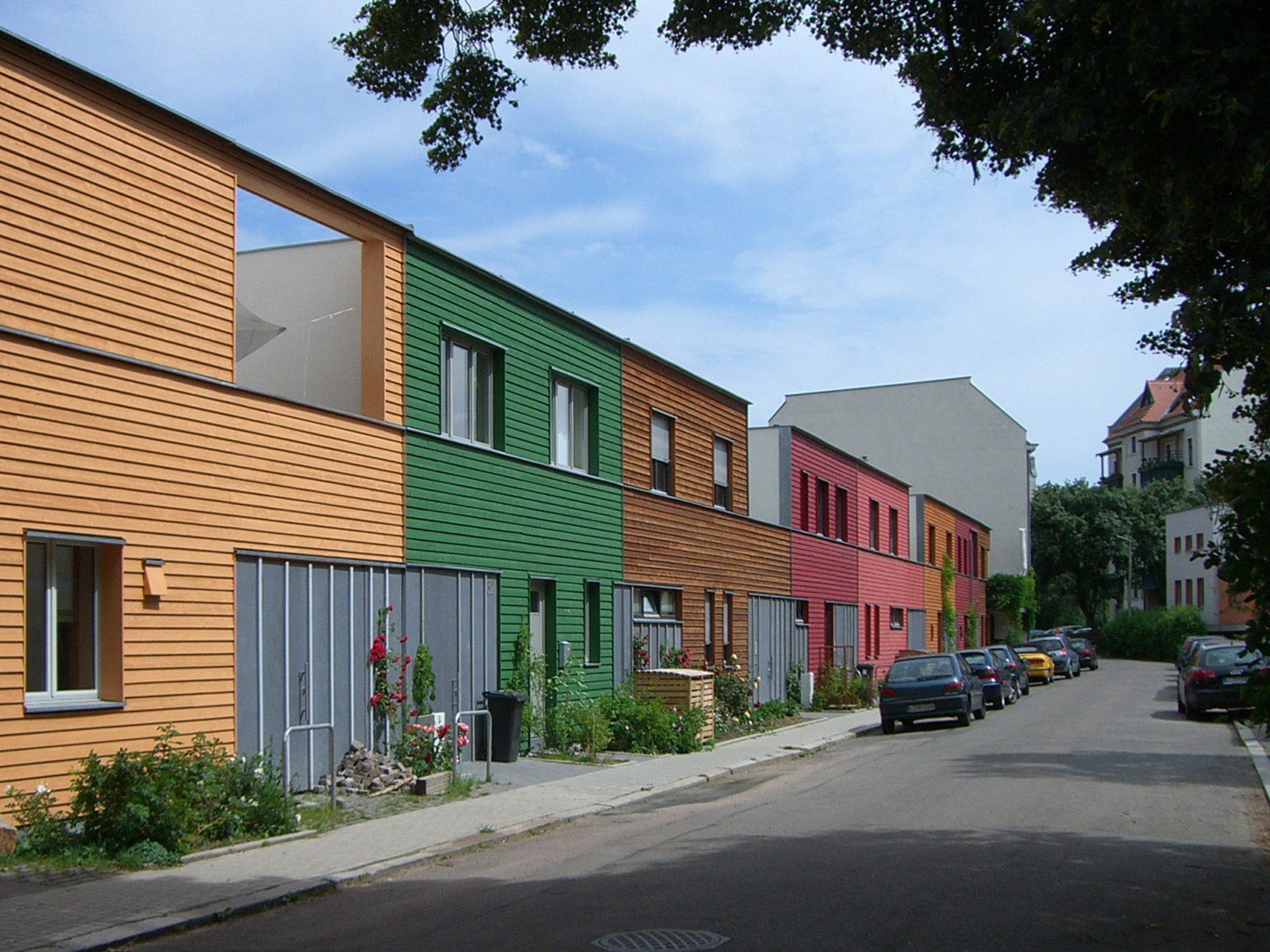 Einfamilienreihenhäuser, Roßmäßlerstraße, Leipzig-Connewitz, Architekten: Baumeistergruppe Leipzig (A Haberbeck, M Langheinrich, D Manke), 2004-2007.